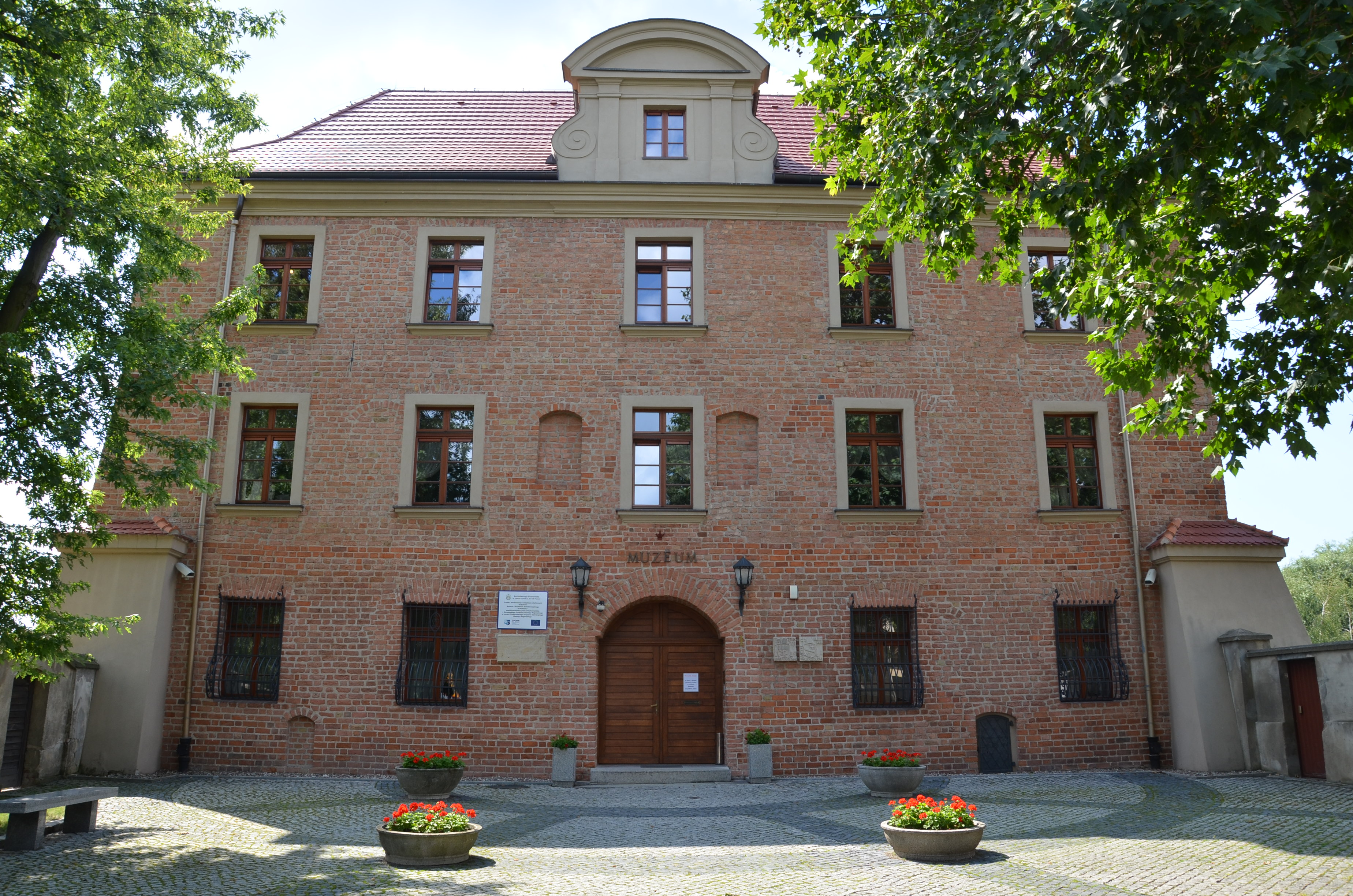 Poznań, Akademia Lubrańskiego, ob. Muzeum Archidiecezjalne, 1510-1530, 1727-730, kon. XVIII, 1925